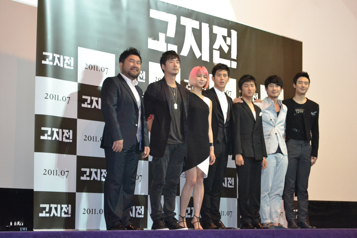 영화 고지전